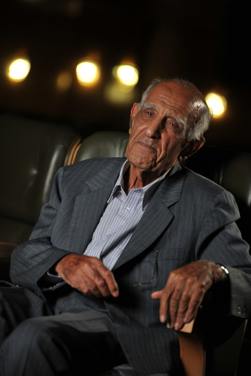 احمد اقتداری در پشت‌صحنه فیلم «به ایران جاودانی‌ام»